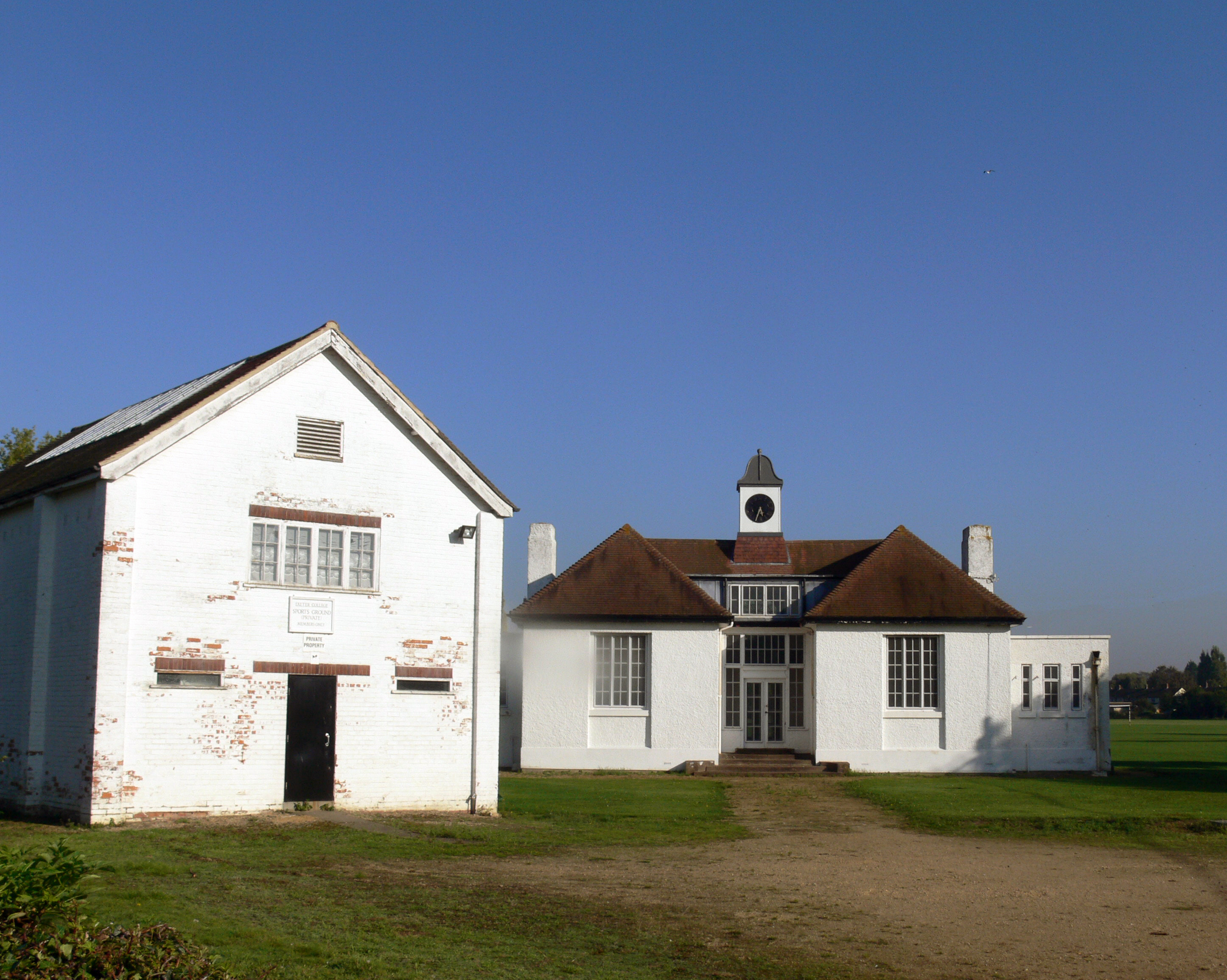 Oxford - Exeter College Recreation Ground Houses